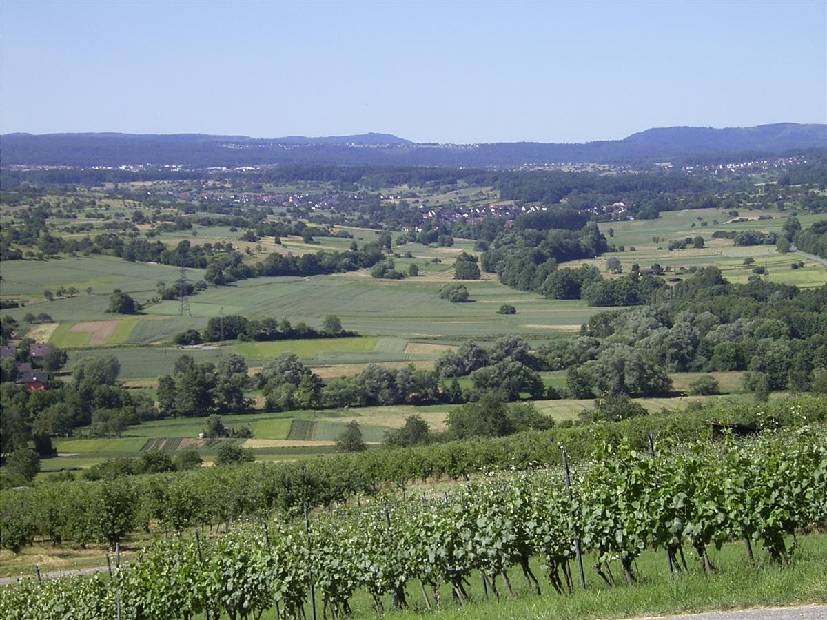 Blick durch die Ellmendinger Weinberge aufs obere Pfinztal